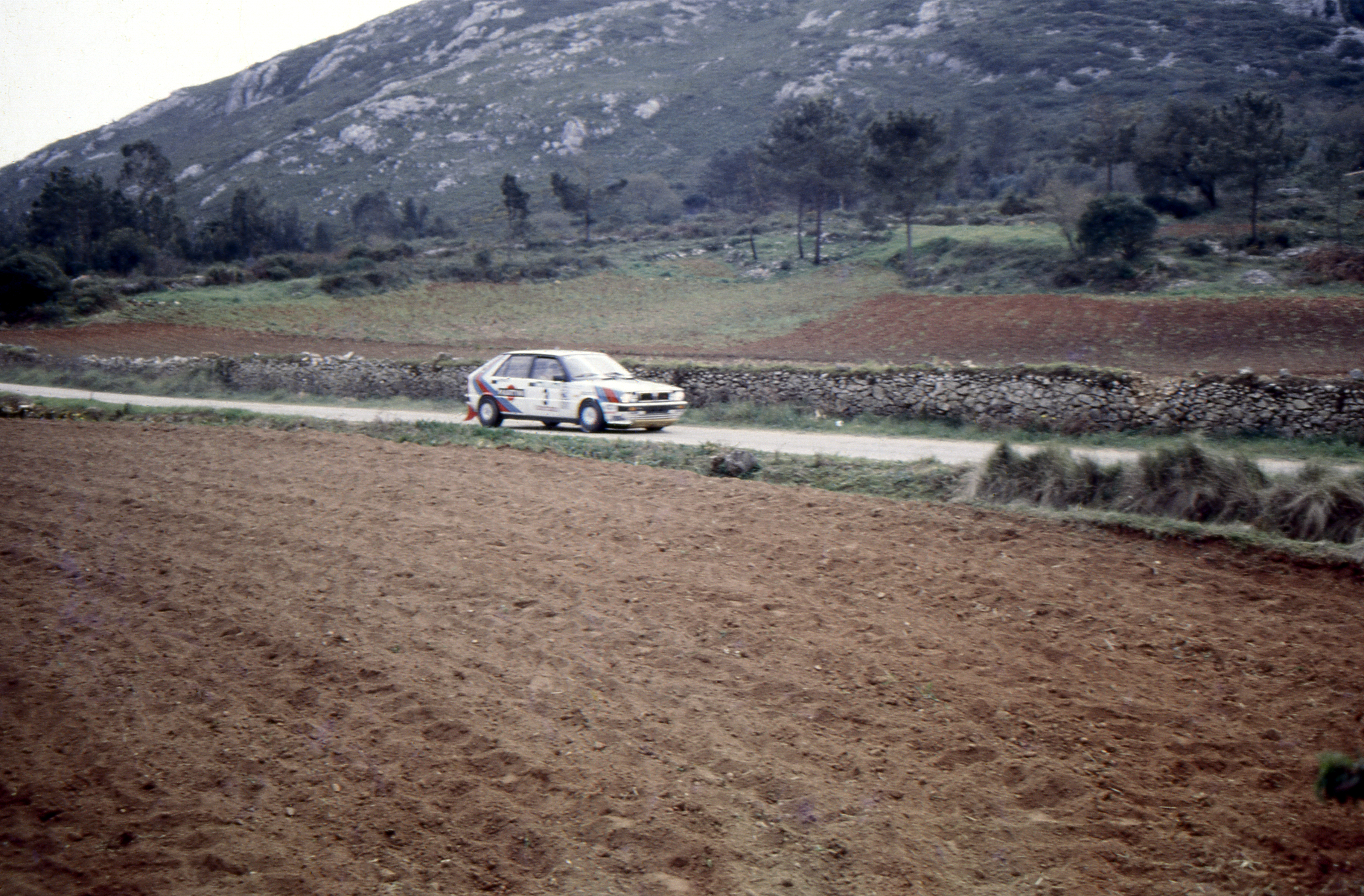 21º Rallye de Portugal - Vinho do Porto 1987 - PEC Montejunto - 11MAR1987 a 14MAR1987